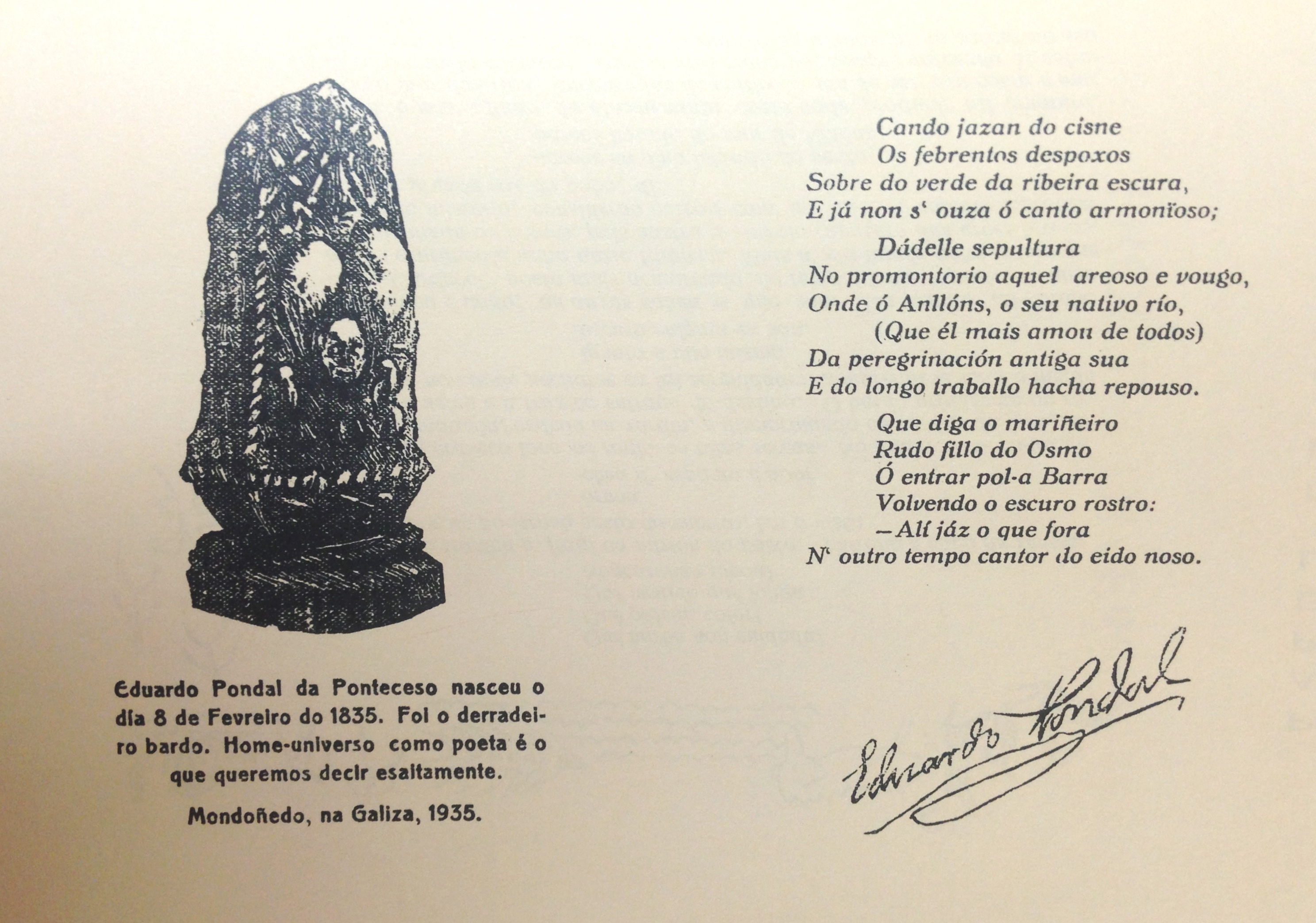 Imaxe do número 5 da revista Papel de Color.